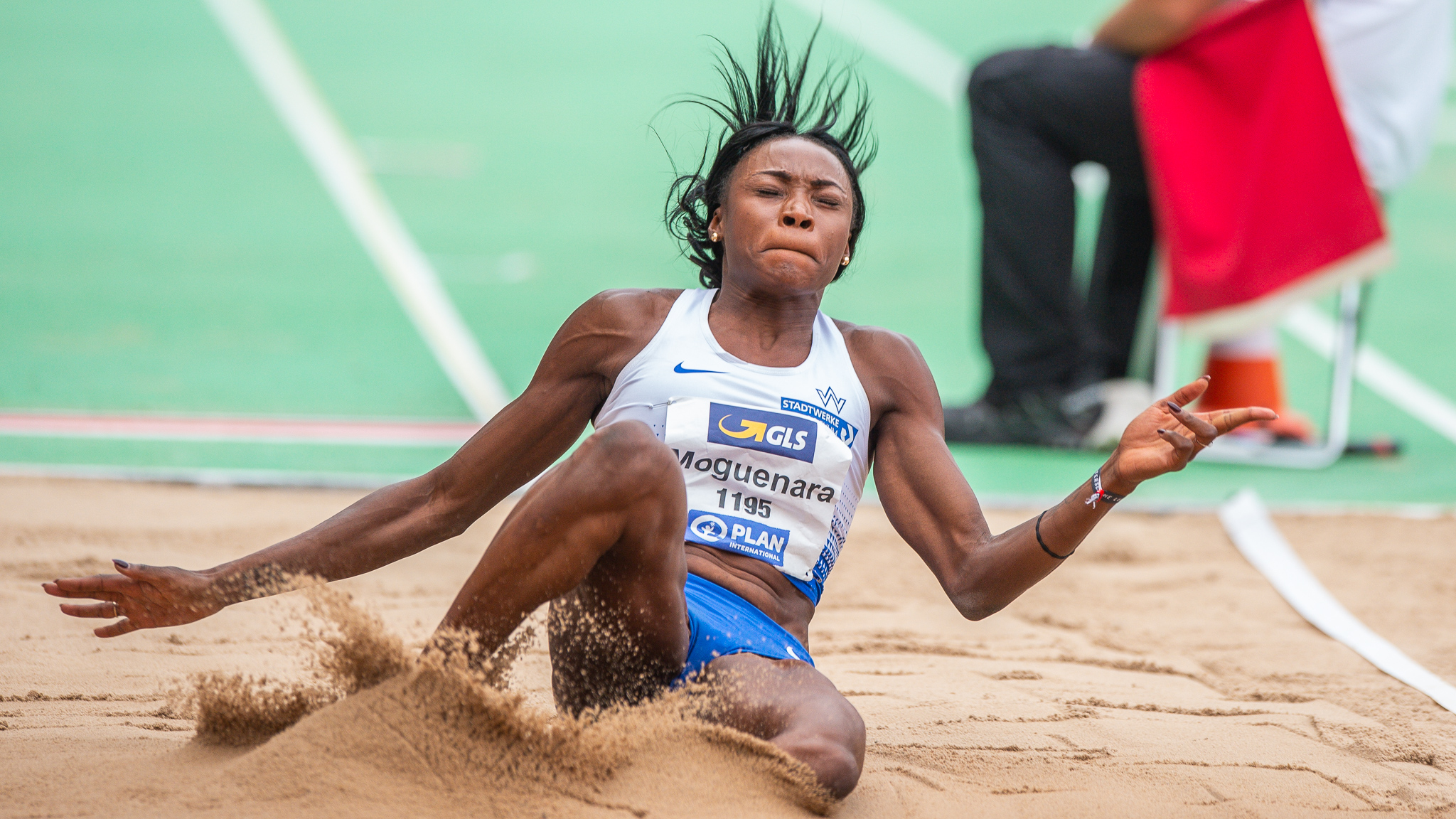 DLV,Deutsche Leichtathletik Meisterschaften 2018,Deutscher Leichtathletik-Verband,Long jump,Max-Morlock-Stadion,Sosthene Moguenara,TV Wattenscheid 01 Leichtathletik e. V.,Weitsprung